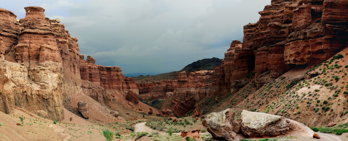 Вид на Чарынский каньон (Республика Казахстан)